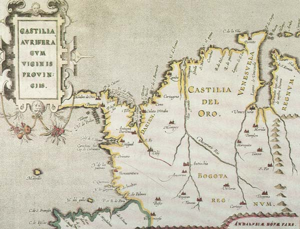 Castilla del Oro